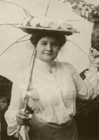 Dénes Zsófia (1885-1987) writer